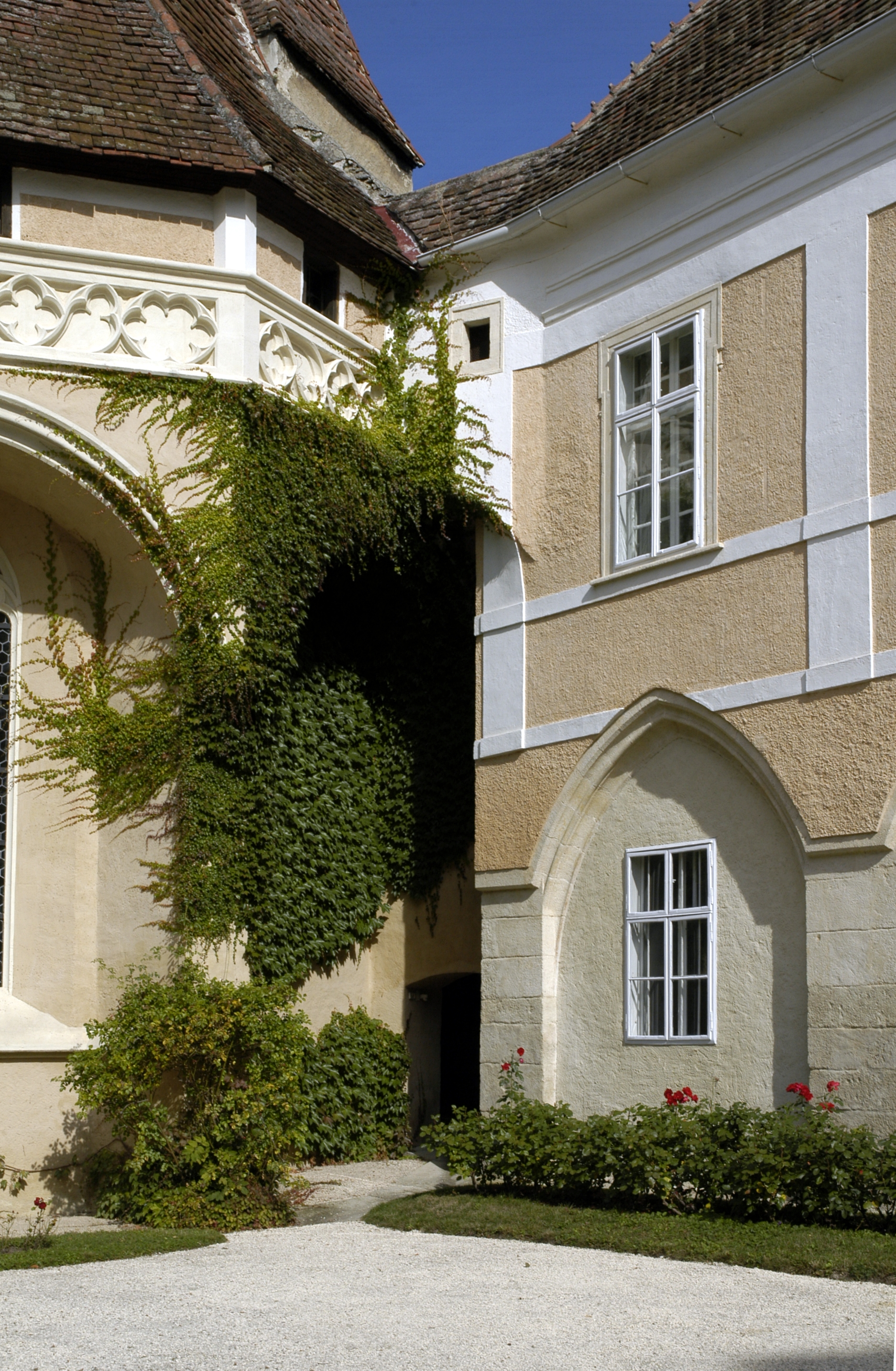 Schrattenthal - Schlosskapelle und Südfassade des Schlosses Dieses Bild wurde anlässlich des österreichischen Tags des Denkmals 2012 in Niederösterreich eingereicht.